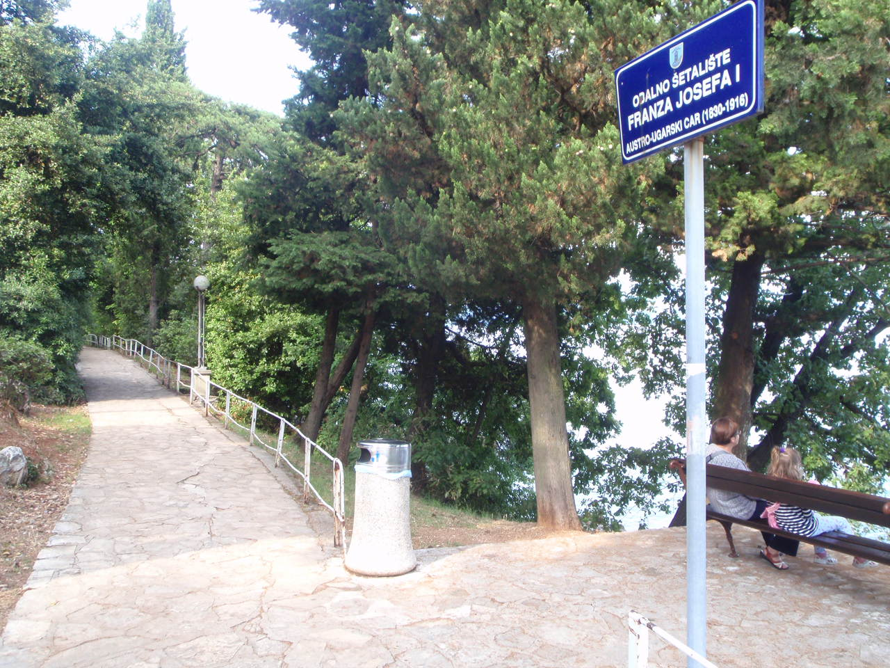 Fussweg von Franz Joseph I in Opatija